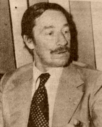 Gobernador de Salta